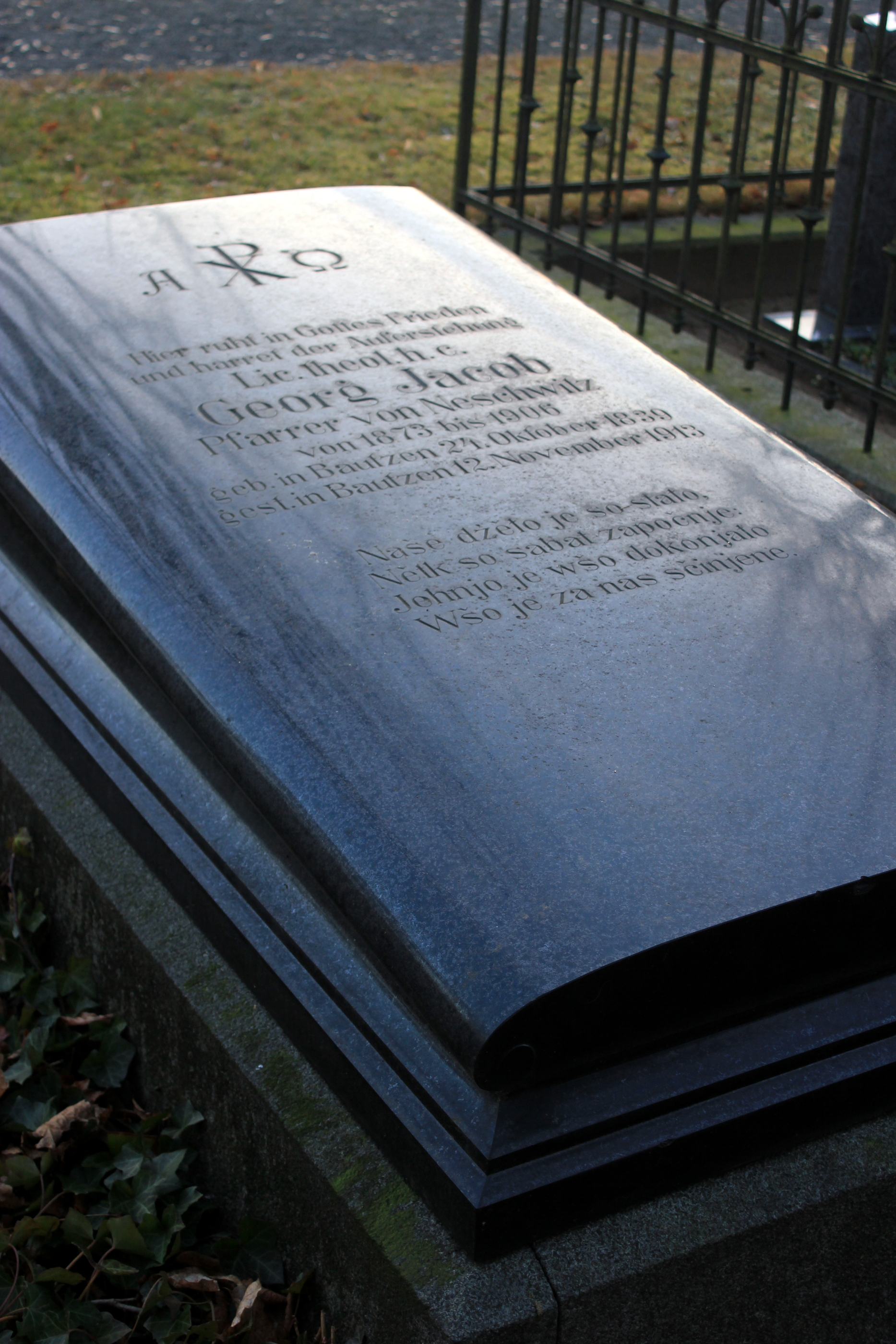 Hornjoserbsce: Narowny kamjeń fararja Jurja Jakuba na Njeswačanskim kěrchowje.